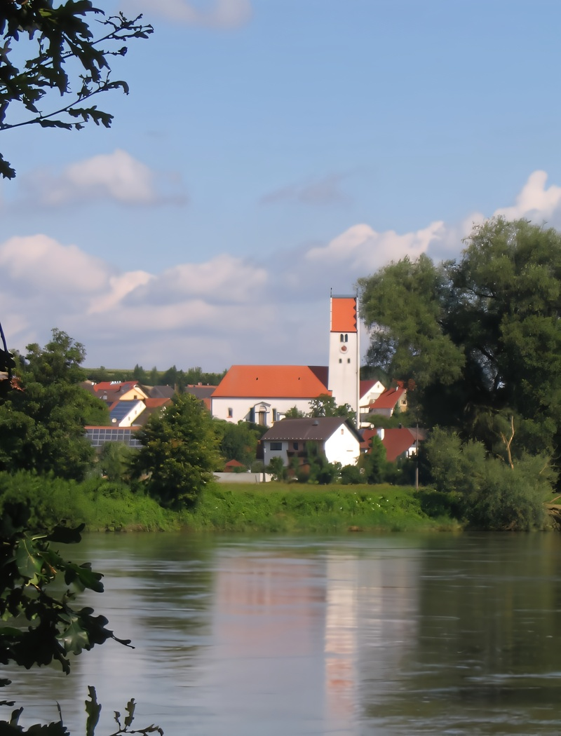 Neustadt an der Donau, Ortsteil Hienheim: Pfarrkirche St. Georg (Ansicht von Einig aus)